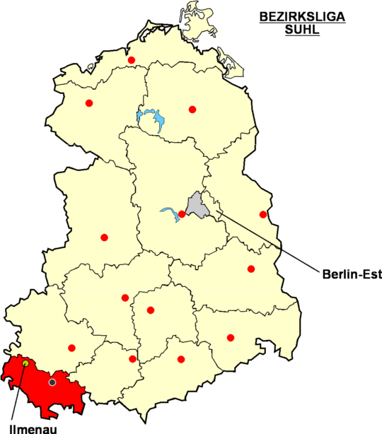 Localisation d'Ilmenau dans la "Bezriksliga Suhl" Catégorie:Logo de clubs de football - Allemagne